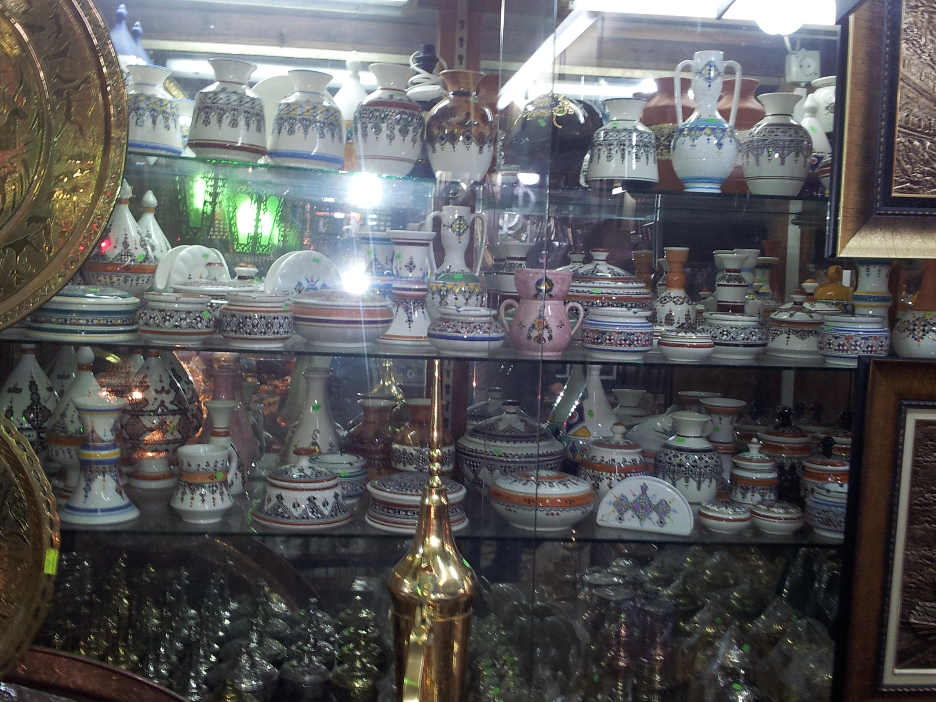 Poterie (Artisanat algérien)